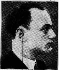 Ο Παναγιώτης Καννελόπουλος σε ηλικία 30 χρονών